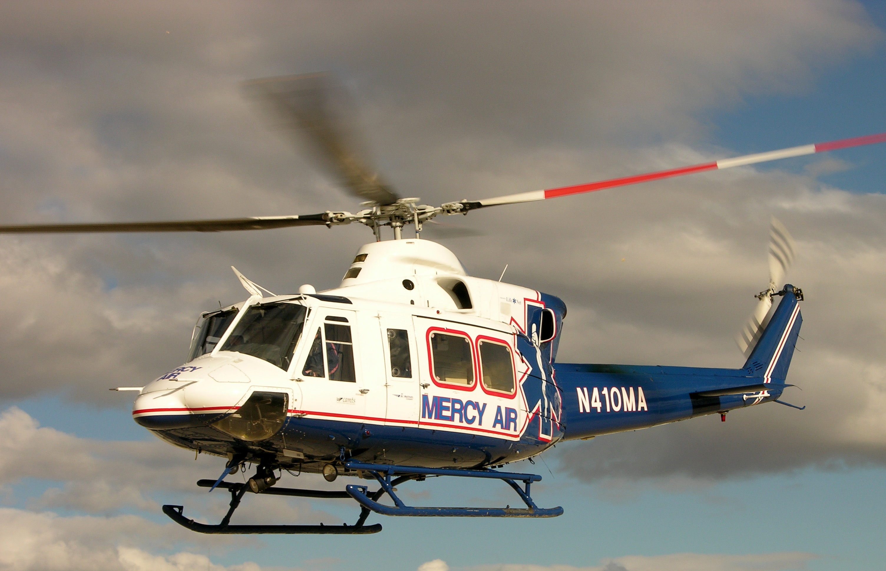 Mercy Air 2, a Bell 412, departs Mojave, CA